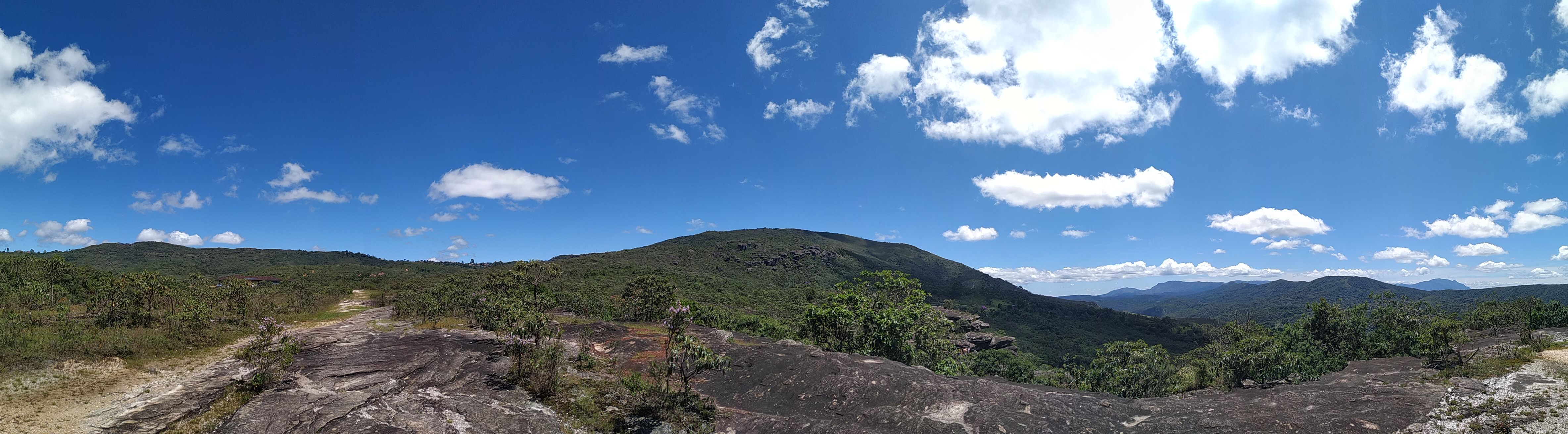 Área de Proteção Ambiental Cachoeira das Andorinhas de nível Estadual, localizado (a) em Ouro Preto (MG)